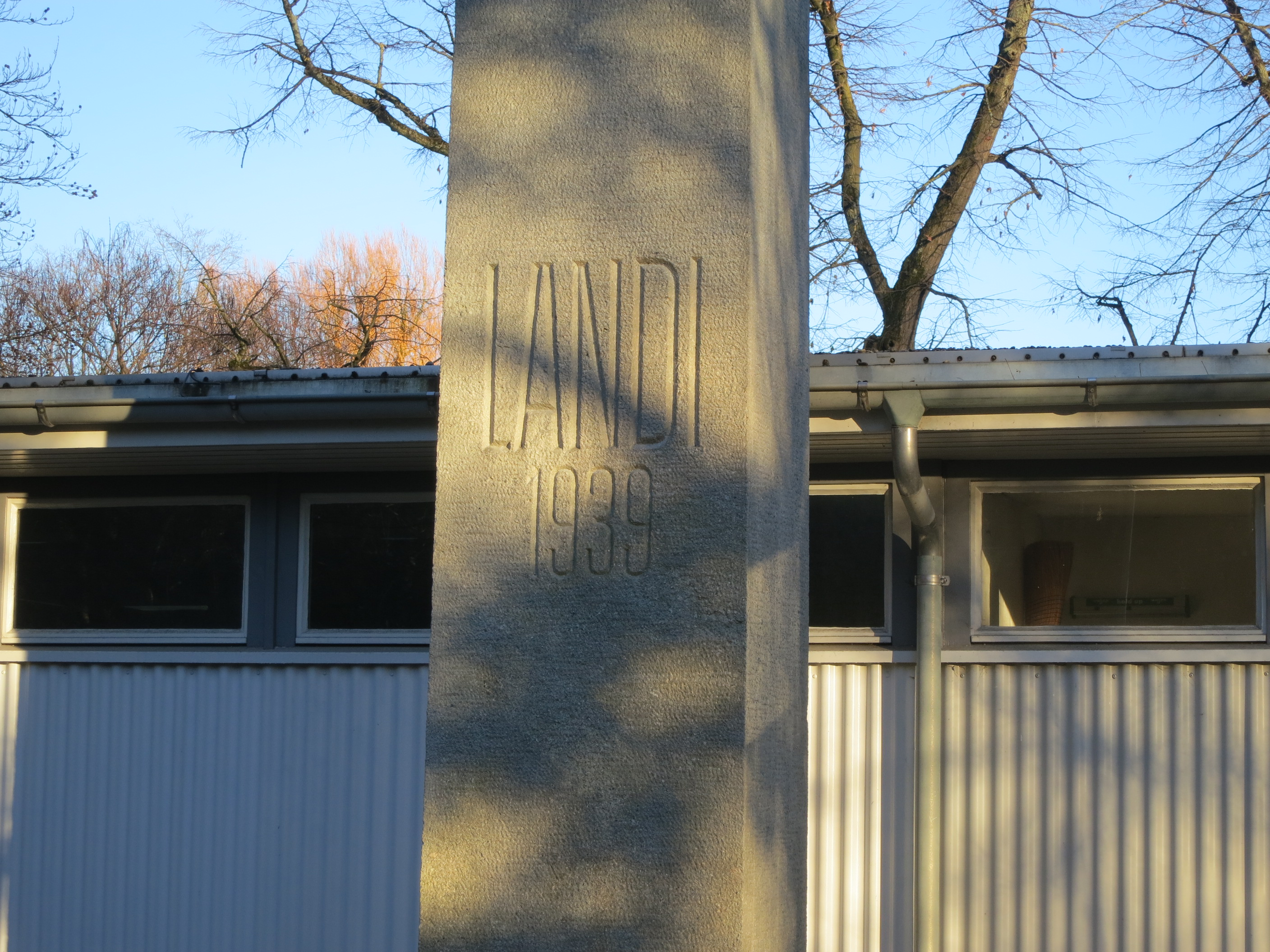 Landi 1939, Zürich-Enge, Schweiz